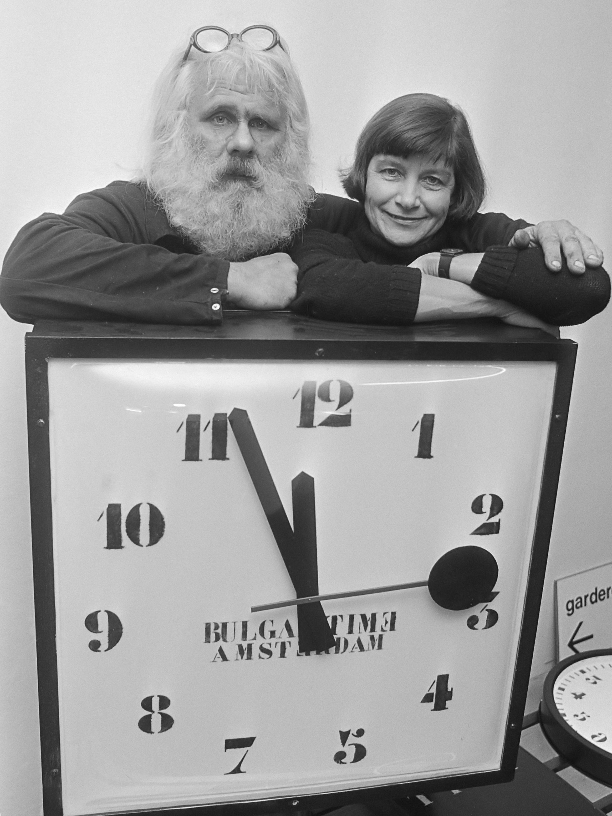 Klokken van Bulgar Finn in Stedelijk Museum Amsterdam. Bulgar Finn (Walter C. Gluck) en zijn vrouw Ina Munch met een van de klokken 30 november 1982